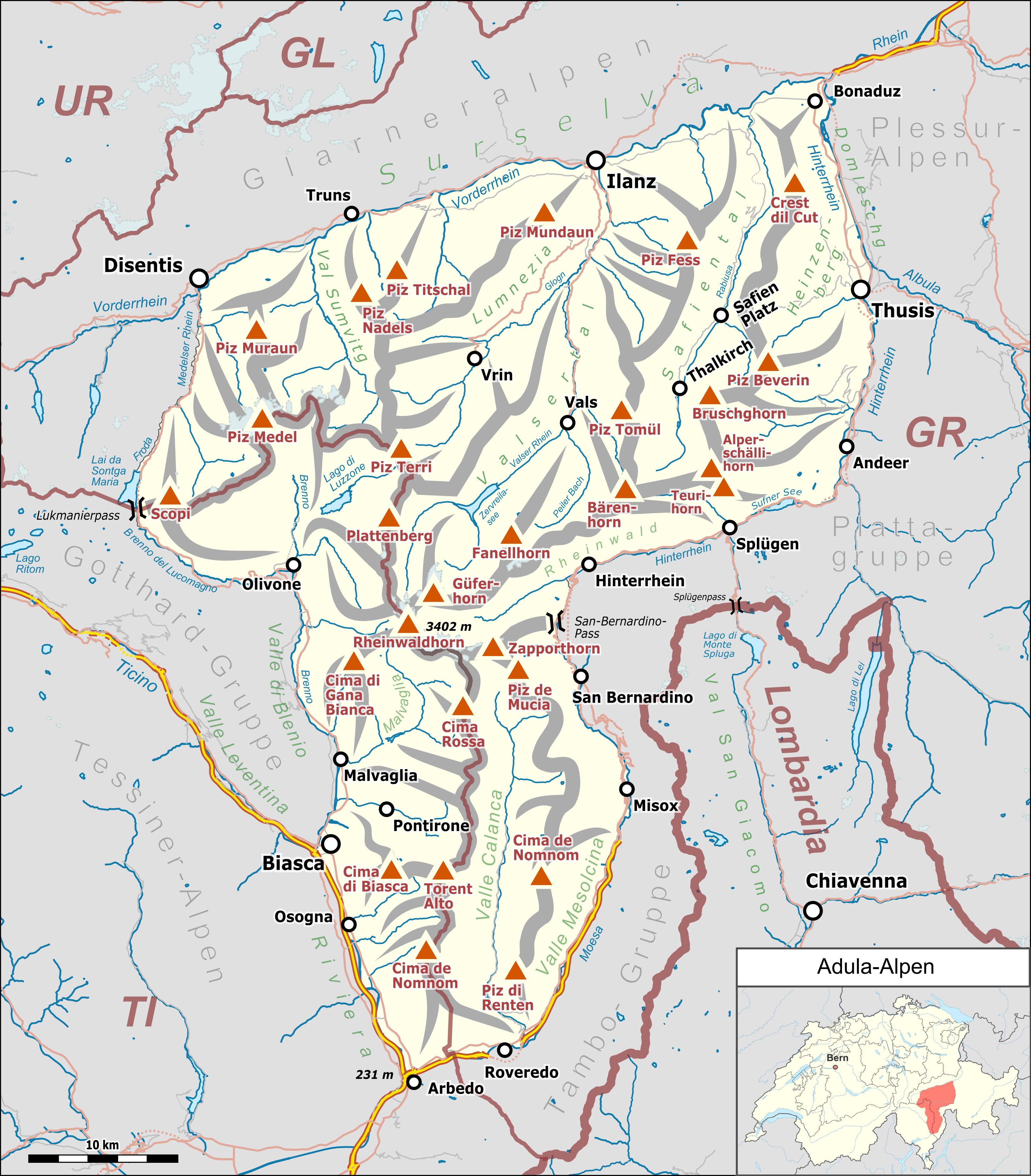 Lagekarte der Adula-Alpen